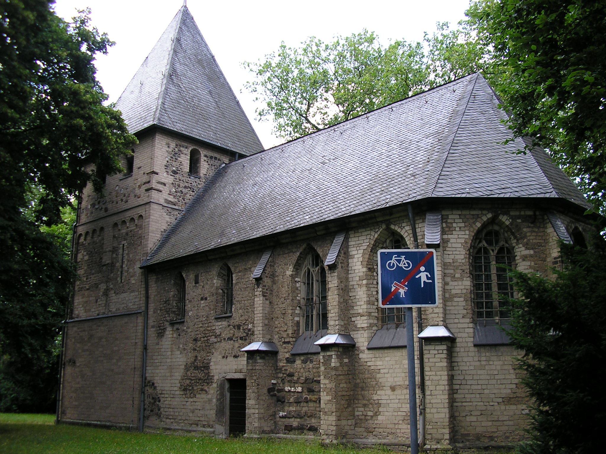 Alt St. Katharina, Köln-Niehl